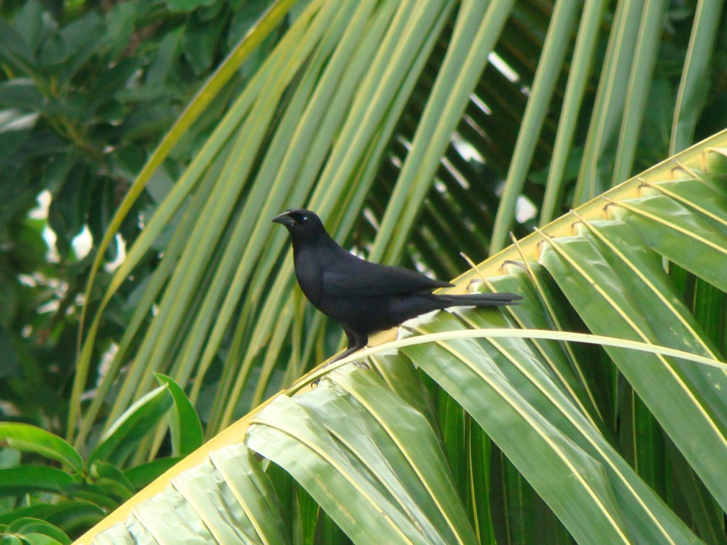 Totí sobre cocotero. Cuba.